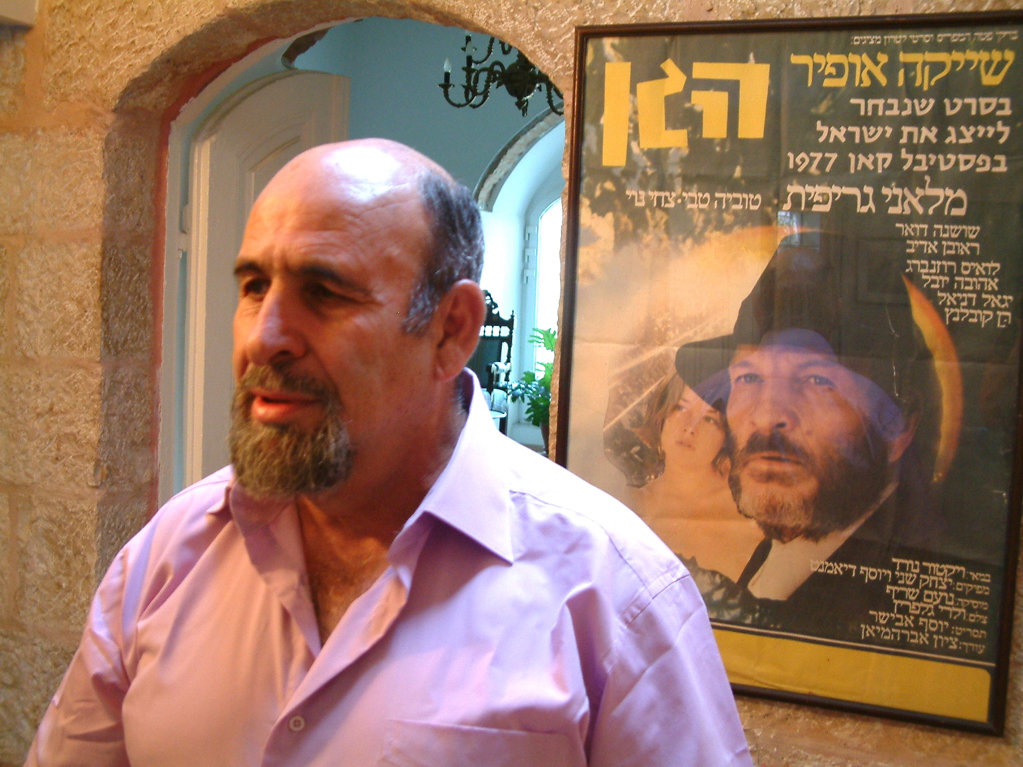 יוסי אבישר בביתו